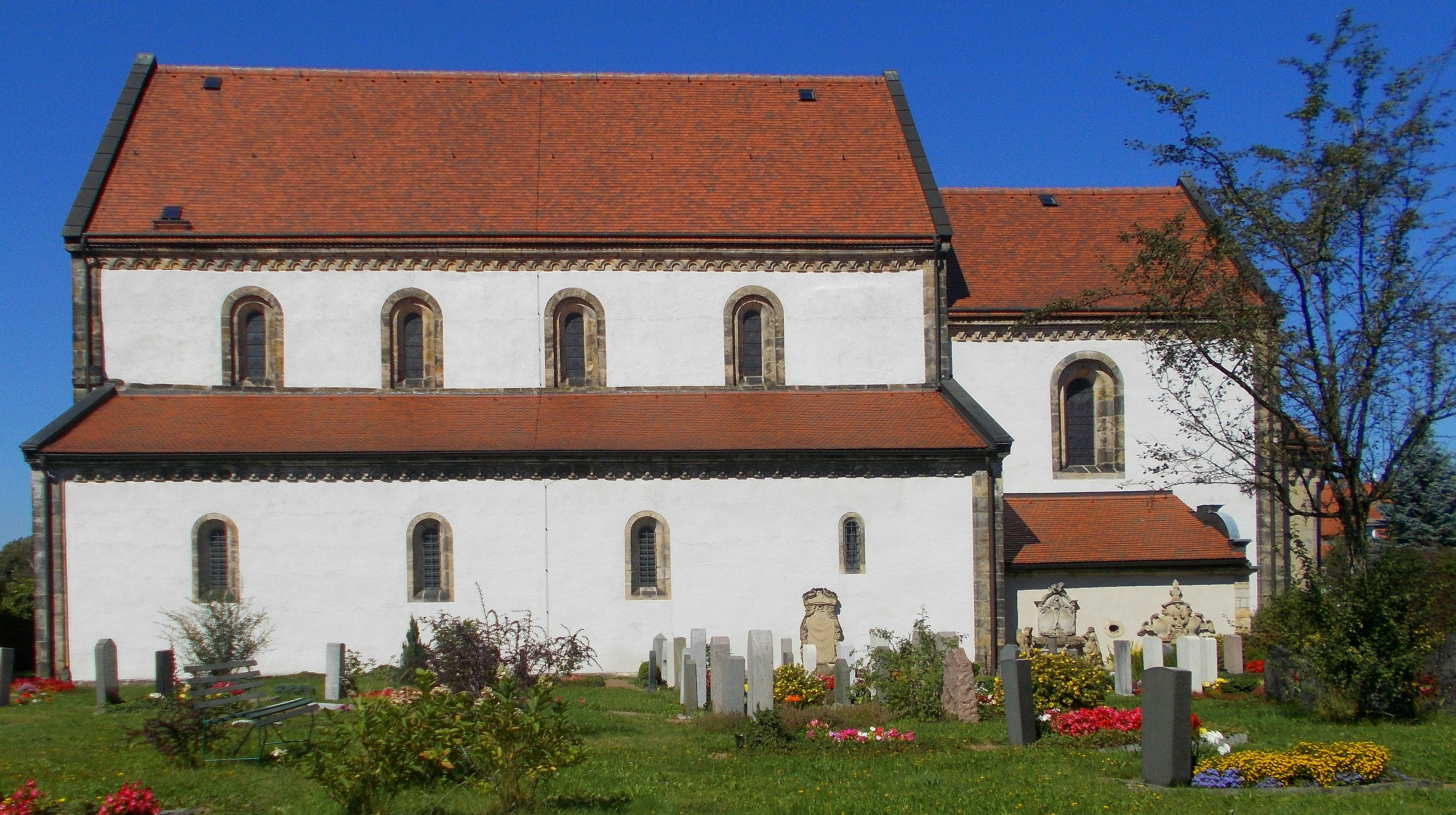 Alte Nikolai-Kirche auf dem Friedhof Dippoliswalde